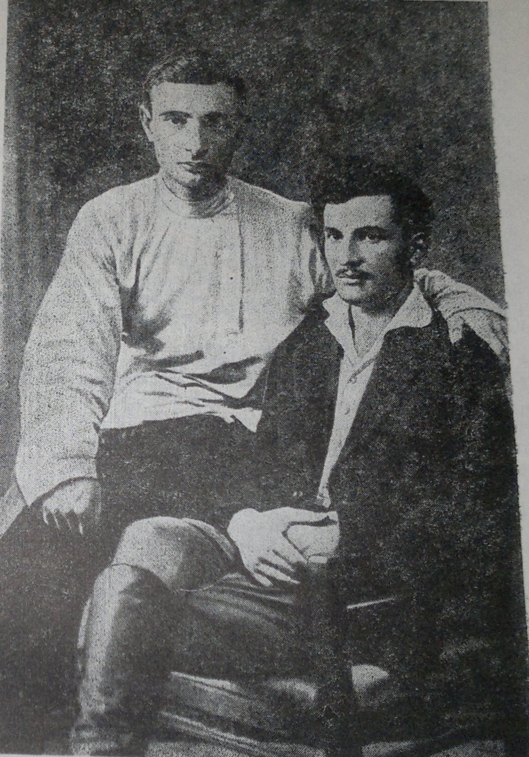 А. Г. Караев и М. Д. Гусейнов.